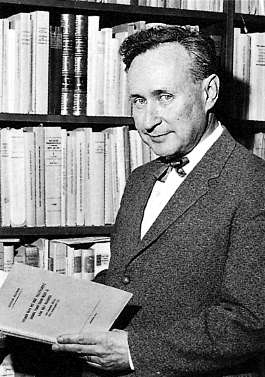 Erik Lönnroth utövade både genom sin rent vetenskapliga gärning och genom sin verksamhet som universitets- och forskningspolitiker ett stort inflytande på svensk kulturpolitik under mer än ett halvt sekel. Foto från 1962.